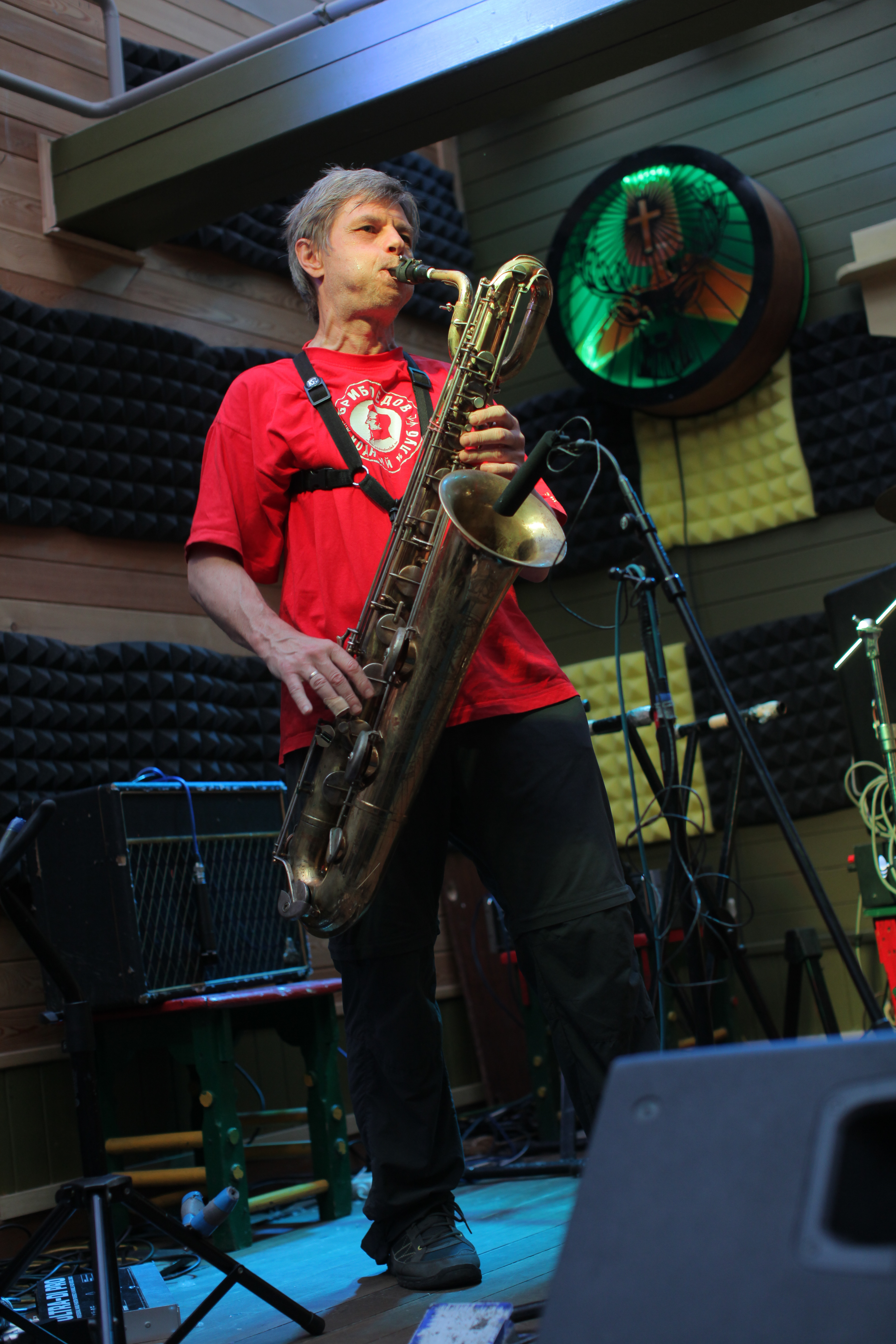 Саксофонист "АукцЫона" Николай Рубанов